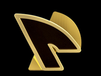 Лого 1 фирмы «Record» v 2.0